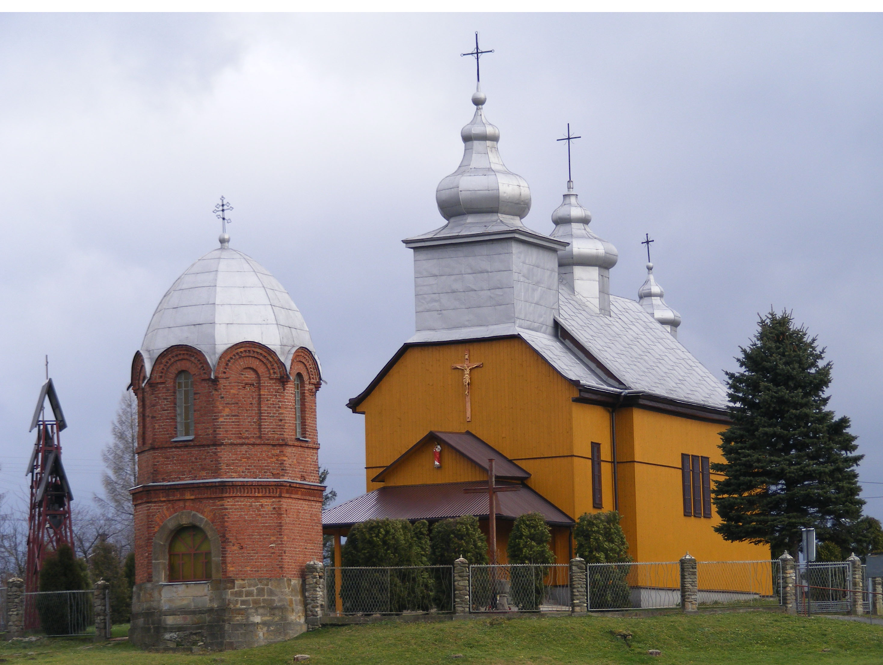 Wróblik Szlachecki kościół, do 1945 cerkiew greckokatolicka.